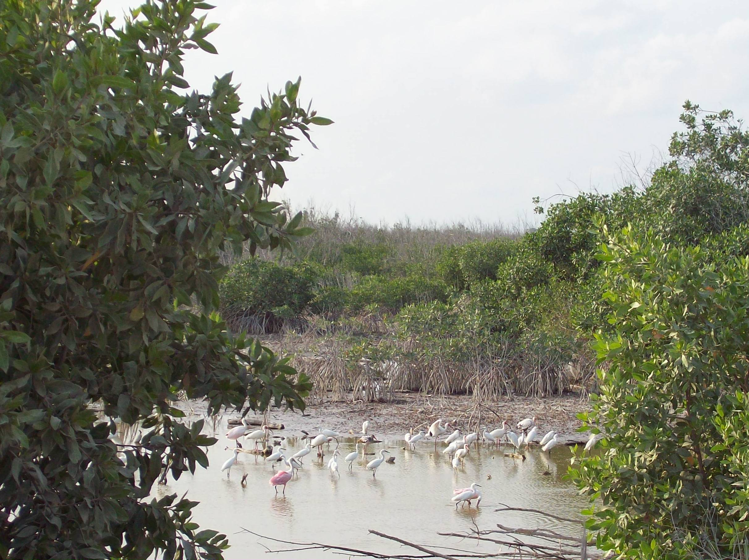 Aves en manglar de Puerto Morelos